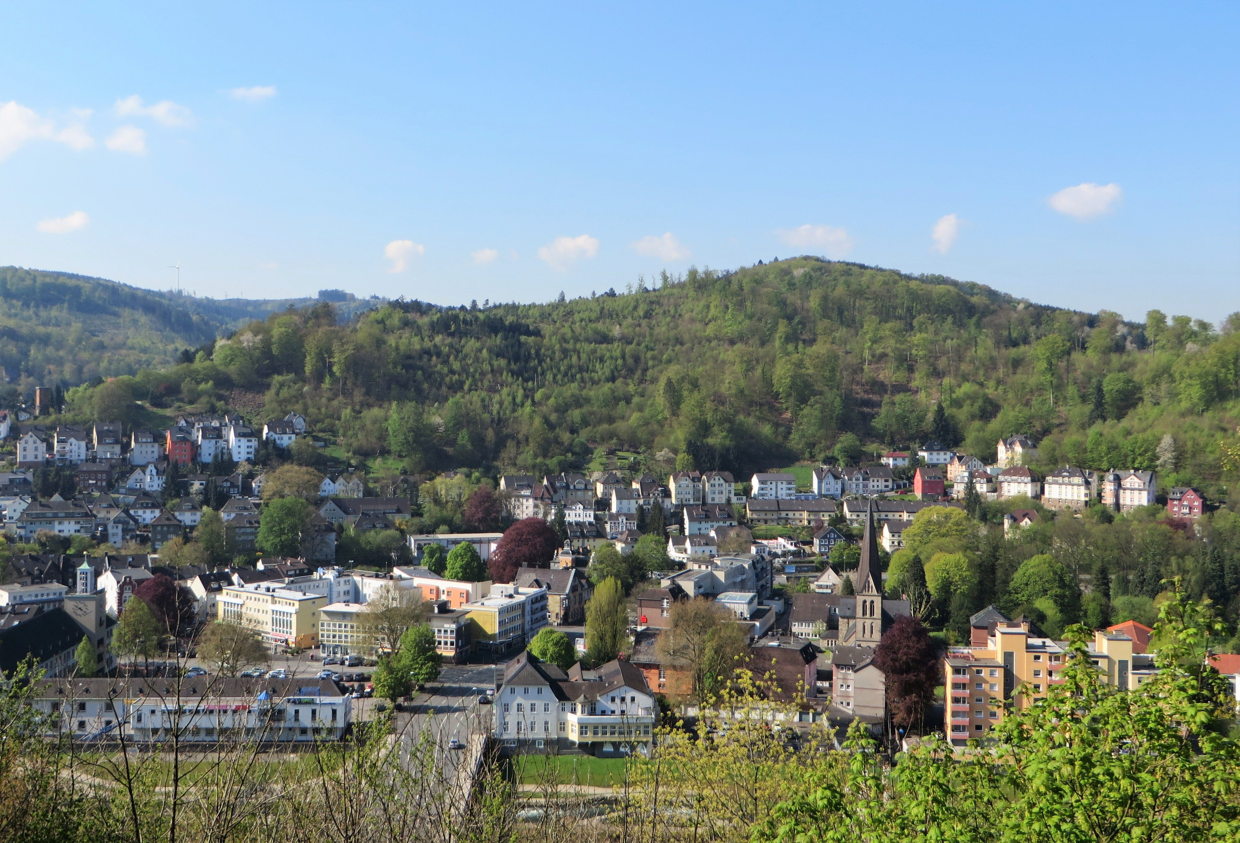 Blick vom Möllerdenkmal am Burgweg auf die Innenstadt des Hagener Stadtteils Hohenlimburg. Der abgebildete Bereich zeigt unten die Stennertbrücke, links davon das Rathaus, rechts den Bentheimer Hof und die katholische Bonifatius Kirche im Weinhof. Am Waldrand links der Wasserturm. Oberhalb der Häuser „An der Kehle“, zwischen Wesselbachtal, Holthausen, bis zur Sauerlandlinie (A 45), liegt das Landschaftsschutzgebiet „Egge“ mit Franzosenschanze (Foto Bergkuppe rechts), Piepenbrink (301 m) und Egge.